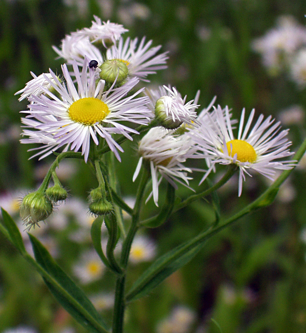 Erigeron annuus (Flower)